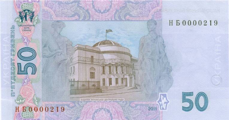 Пам'ятна банкнота номіналом 50 гривень зразка 2004 року (2011), реверс